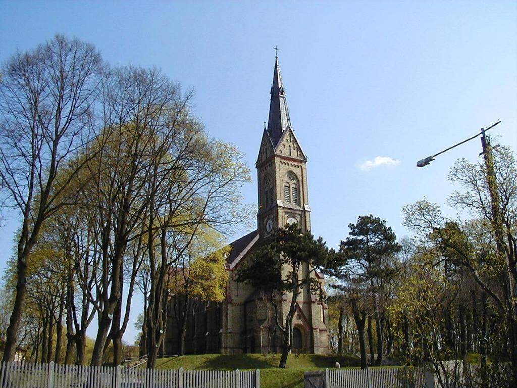 Rīga, Lutera baznīca 2002-04-27